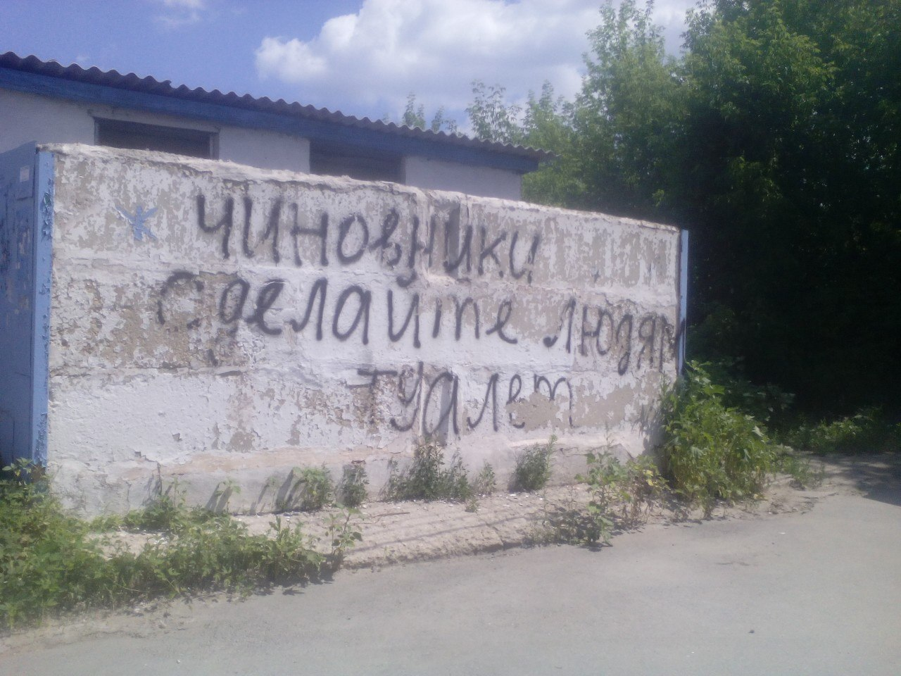 "Чиновники, сделайте людям туалет!"